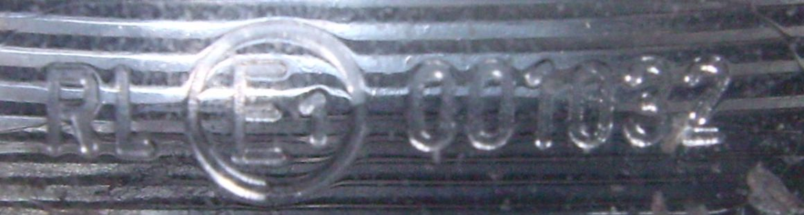 Genehmigungsnummer einer Leuchte für Tagfahrlicht, Buchstaben RL für running lights